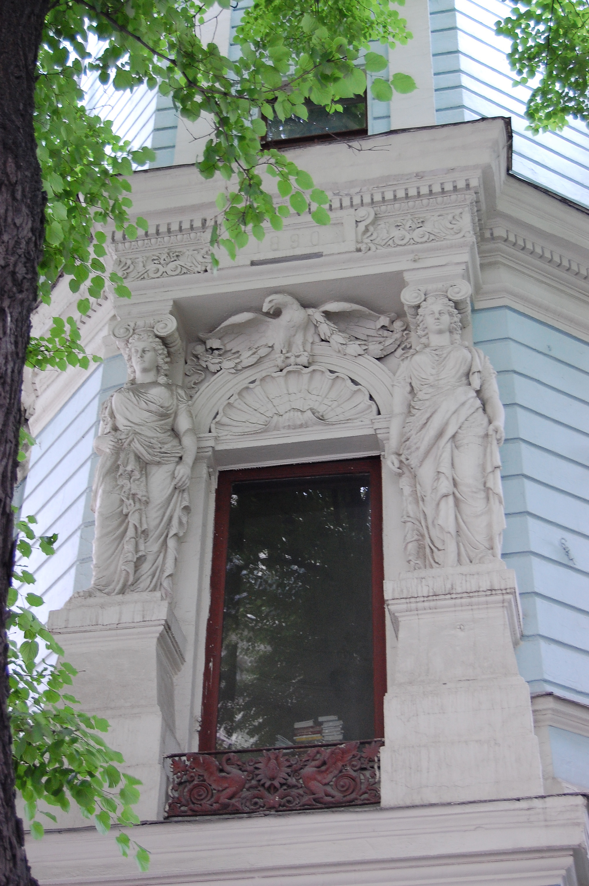 Городская усадьба В. Я. Лепёшкиной, угловой эркер